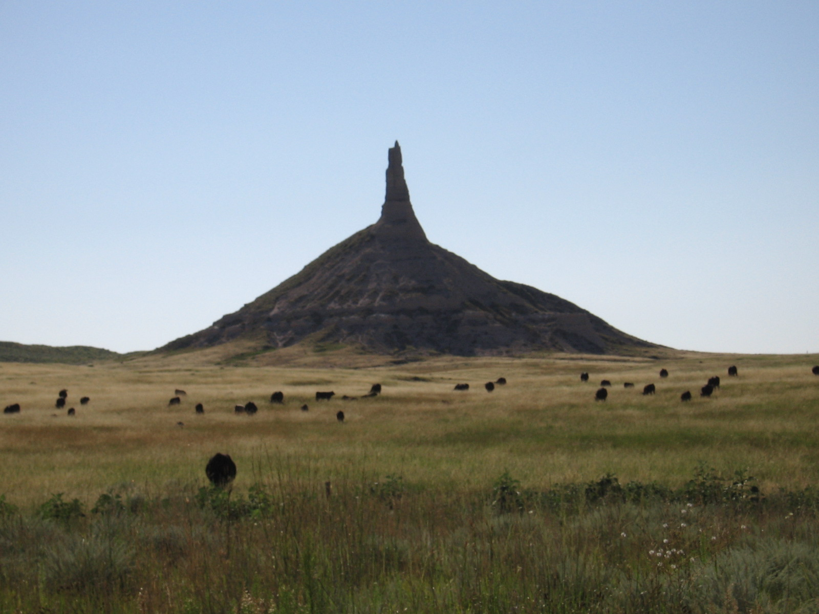 Chimney Rock, Nebraska, USA